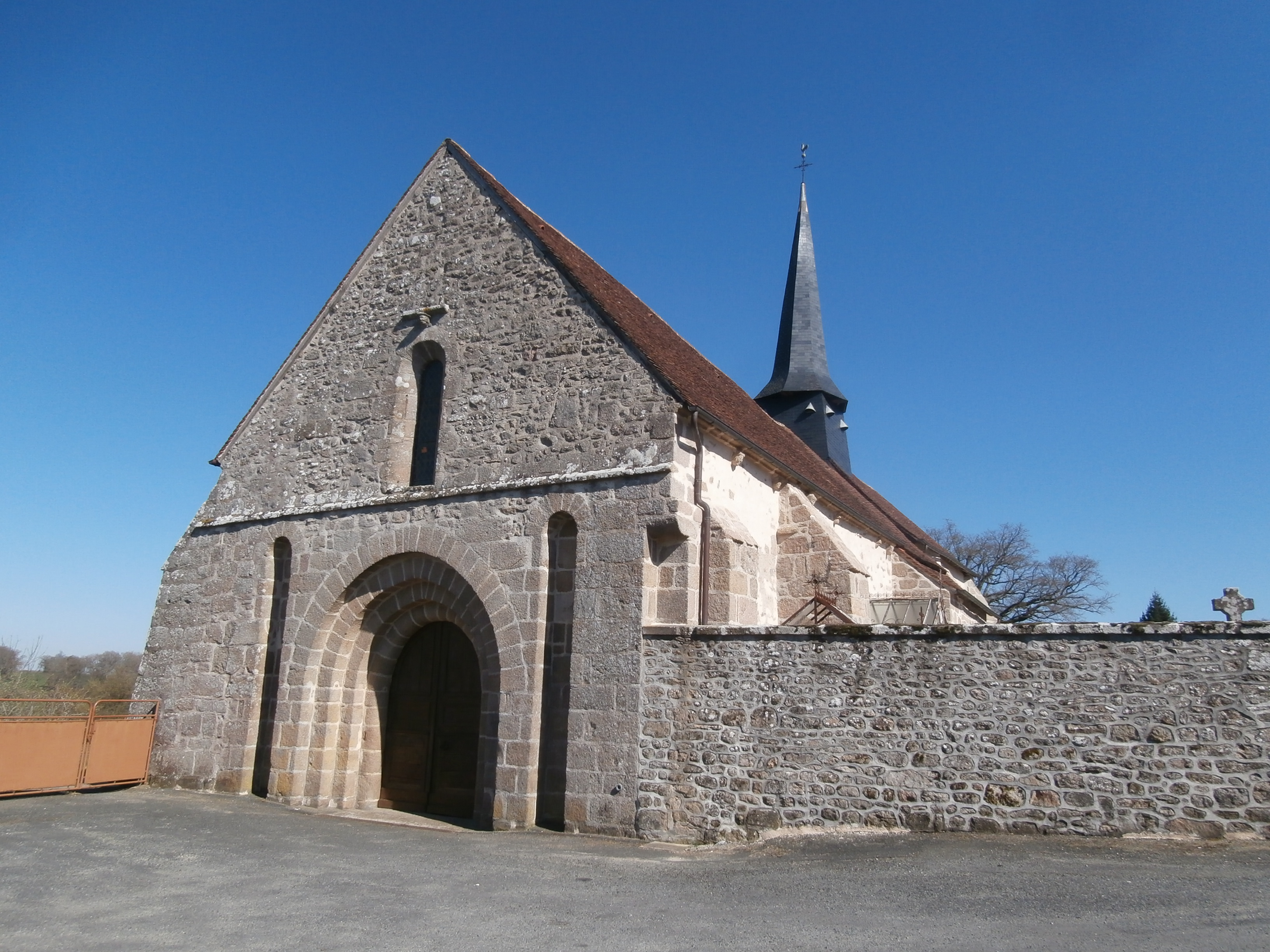 Construite aux XI, XII et XV siècles. Cette église était placée sous le patronage de l'abbaye de Déols, dans la dépendance du diocèse de Bourges, avant la Révolution.